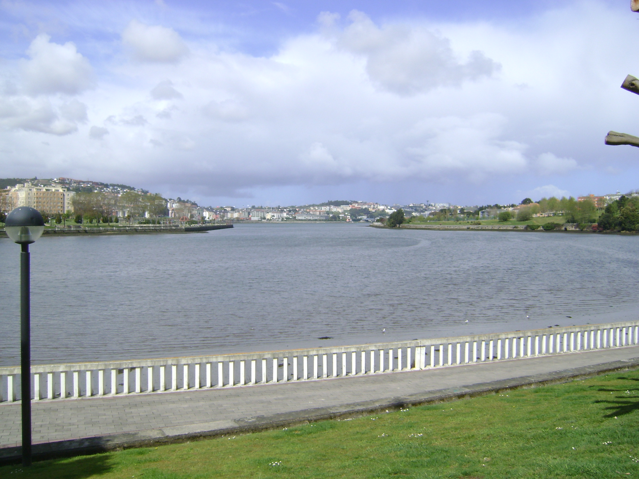 Área metropolitana de La Coruña, España